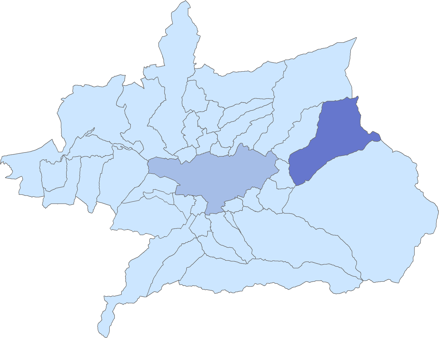 Situación del municipio de Quéntar respecto a la comarca de la Vega de Granada, en España.